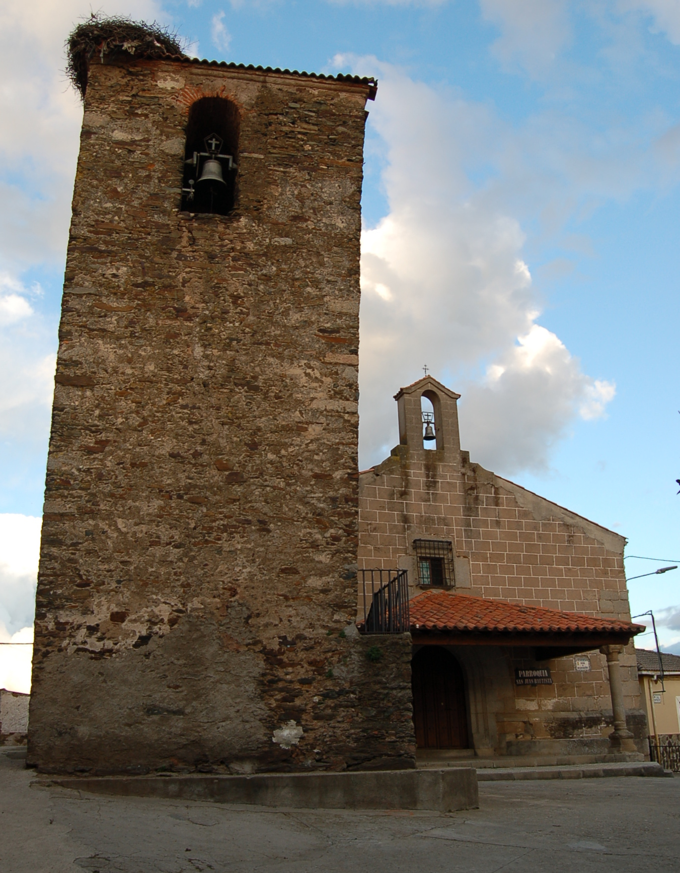 Iglesia y campanario de Cerezo